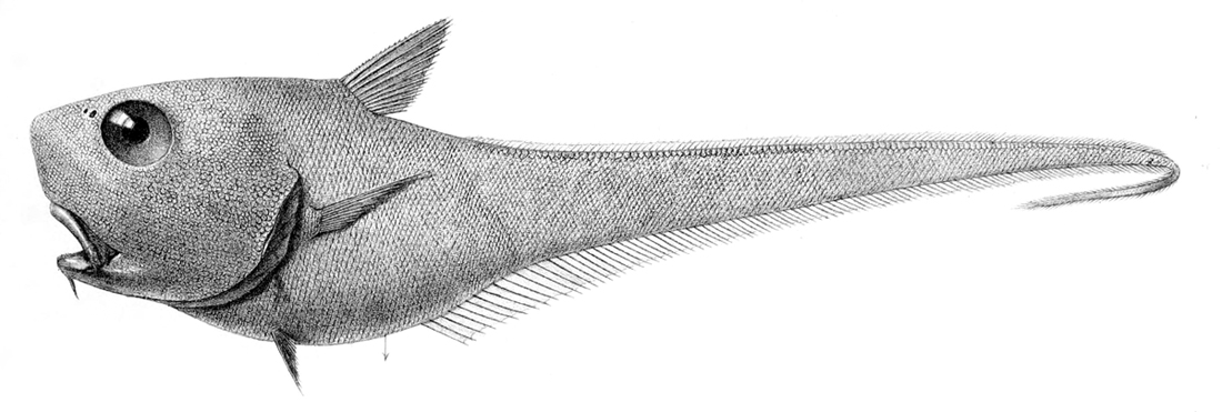 Cetonurus crassiceps